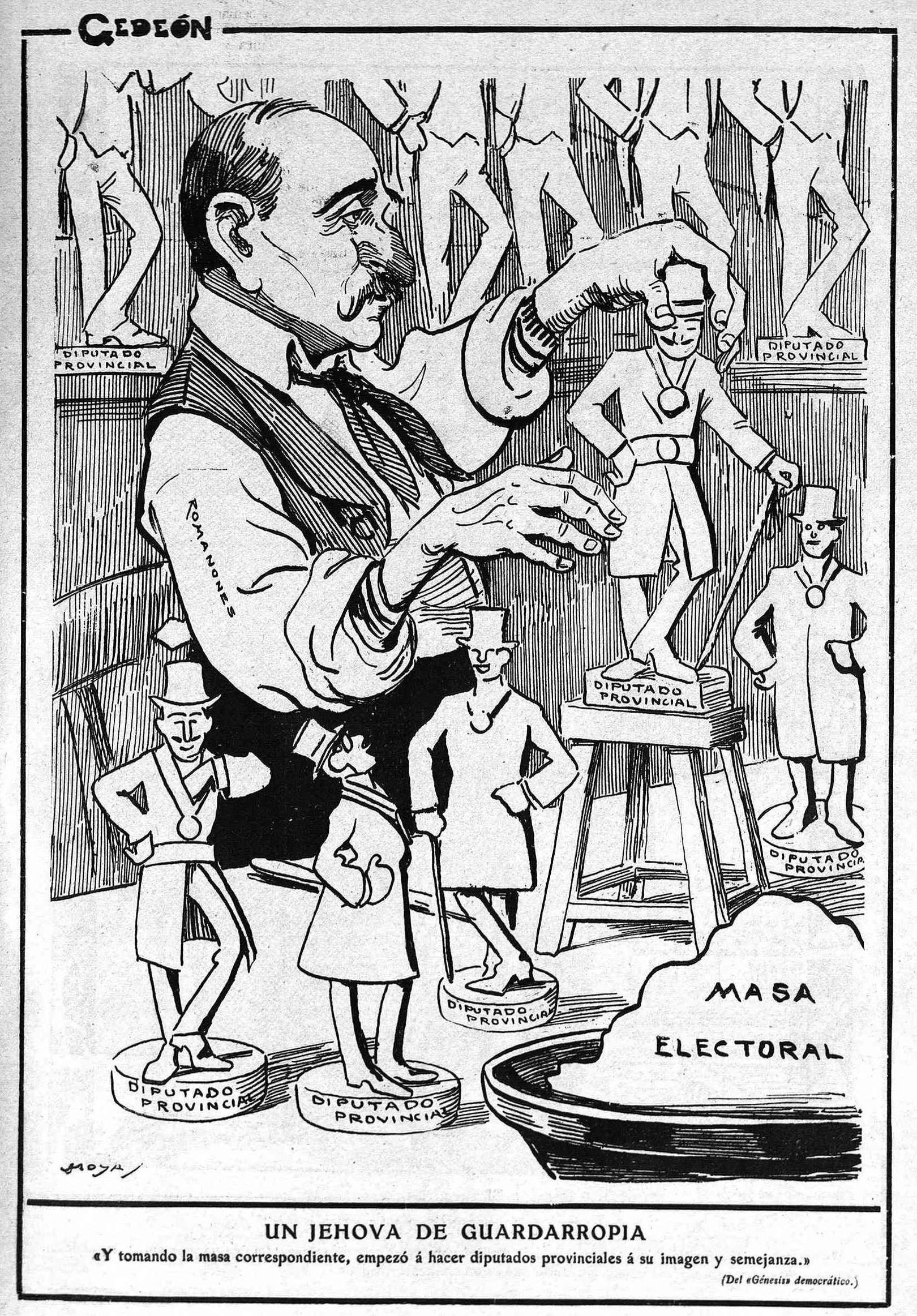 «Un Jehová de guardarropa», en la revista satírica española Gedeón.